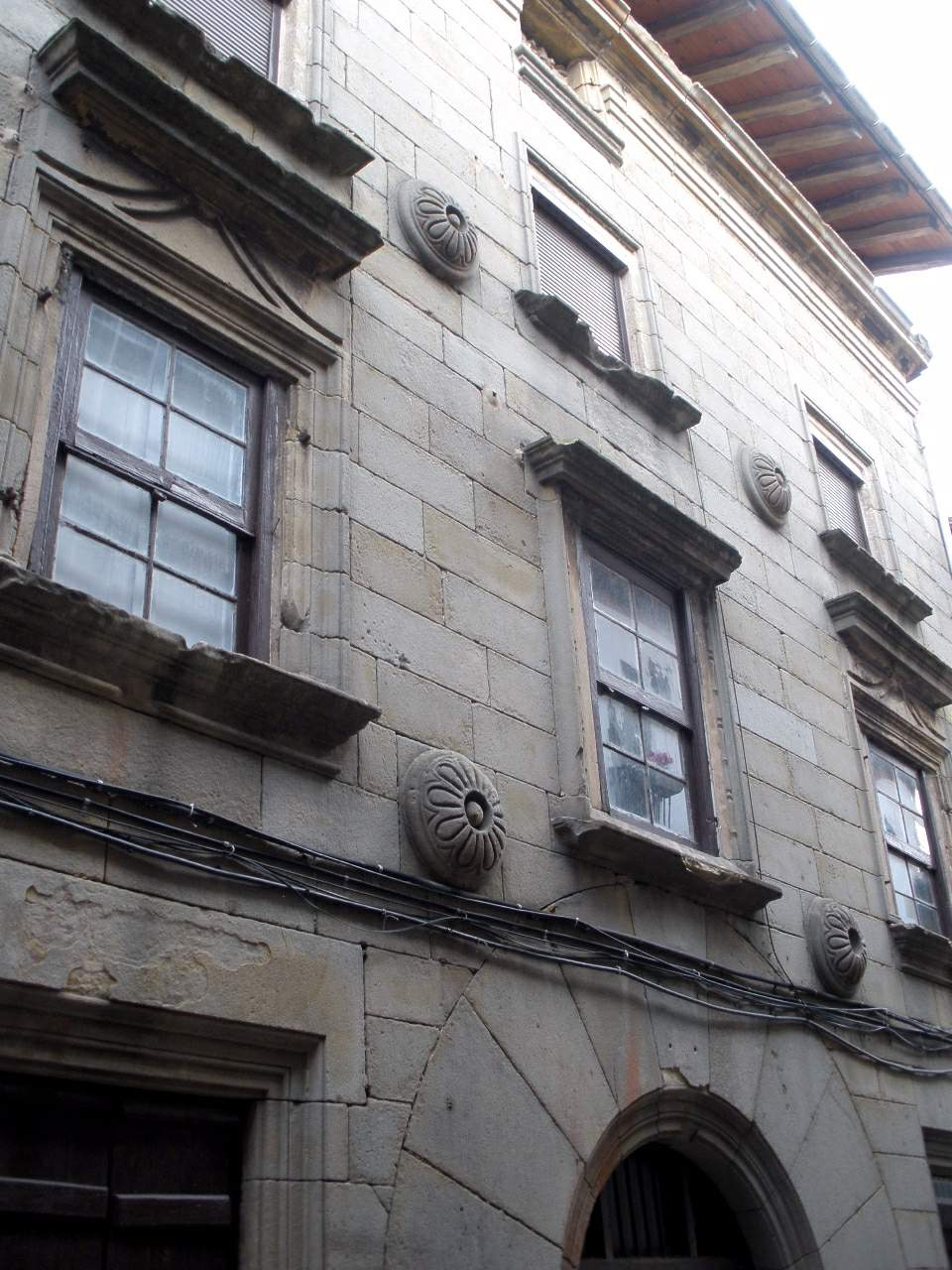 Orio (Gipuzkoa)